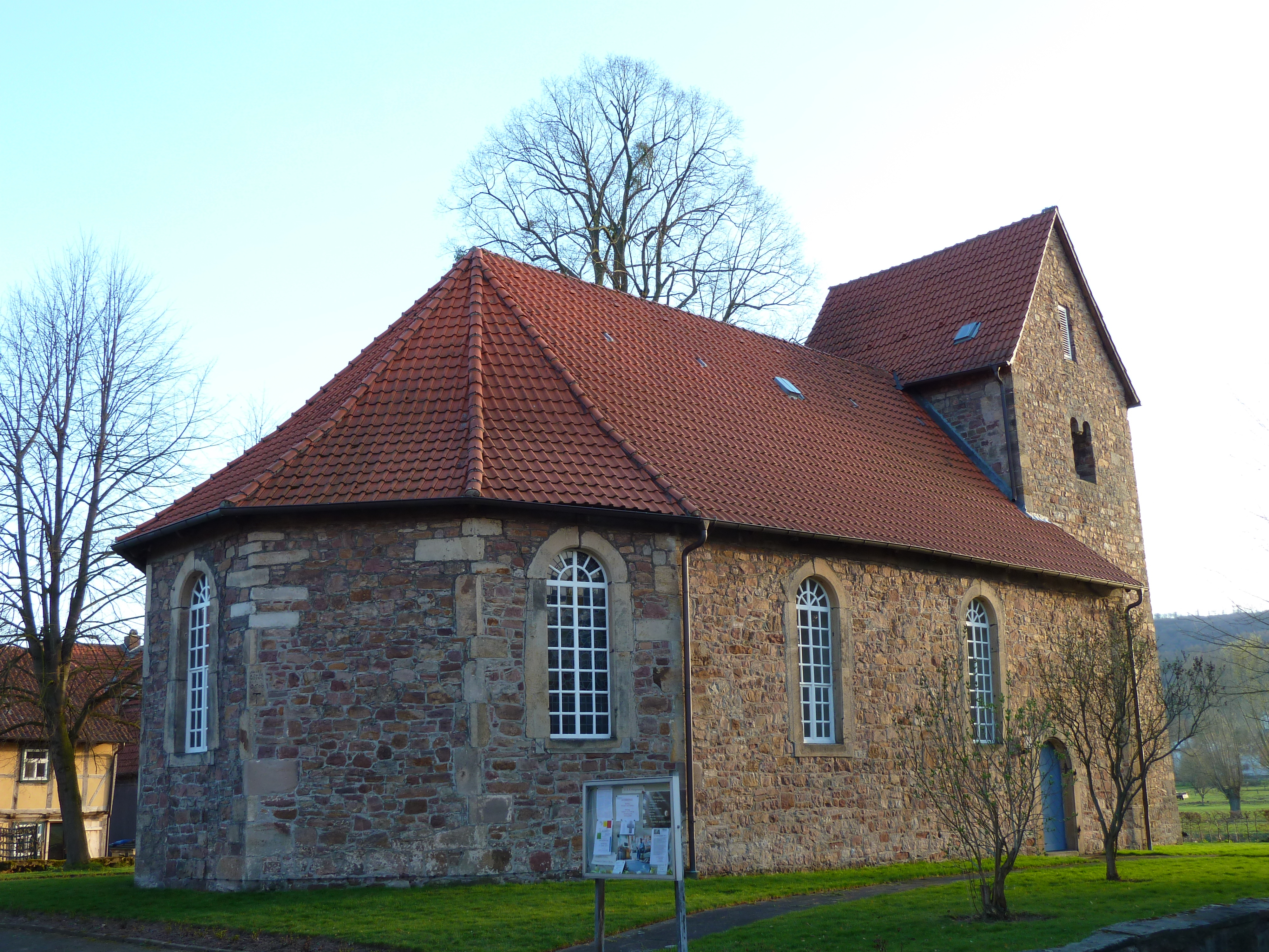 Ev.-luth. Marienkirche in Hemeln, Stadt Hann. Münden, Südniedersachsen. Turm romanisch, vermutlich Ende 12. Jahrhundert, einschiffiger Kirchensaal 1681 angebaut (Datierung über Portal)